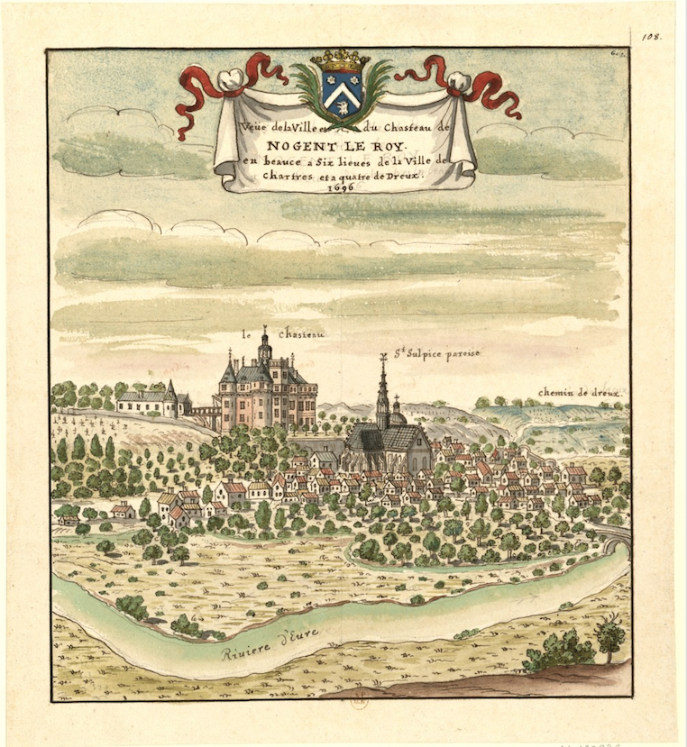 Vue de Nogent- le-Roi en Beauce en 1696 par Louis Boudan (?) aquerelle et encre.